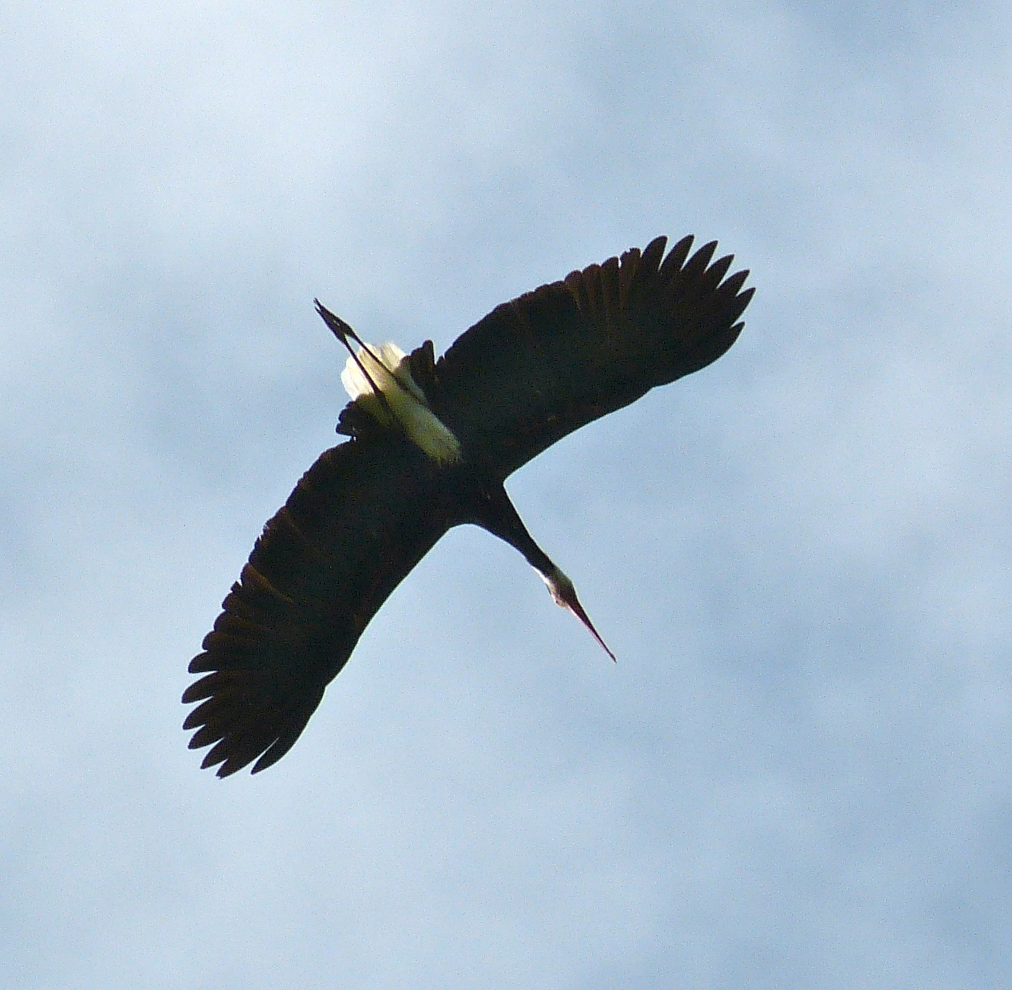 Bilit, Sabah, MALAYSIA